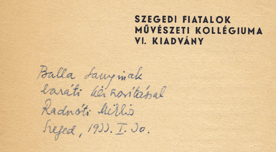 Radnóti Miklós dedikációja a Szegedi Fiatalok Kollégiumának titkárának, Balla Sándornak, 1933. (Lábadozó szél). Szeged.